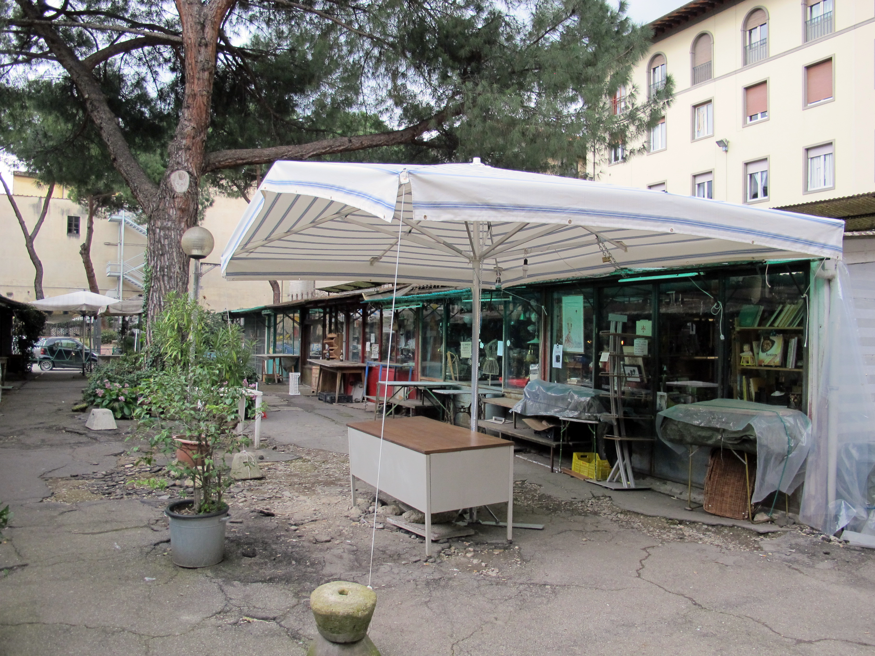 Mercato delle pulci dei ciompi